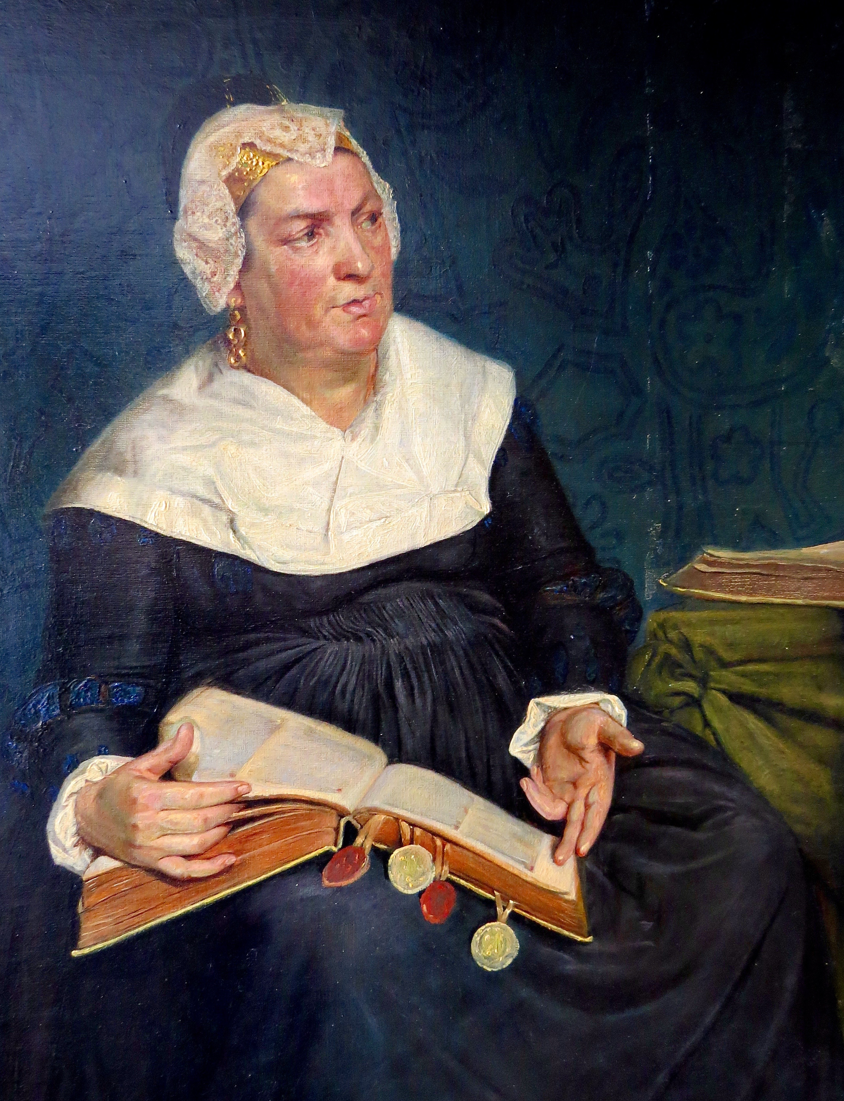 Detalje fra «Sigbrit gennemgår toldregnskaberne med Christian II», maleri fra 1873 af Kristian Zahrtmann, Frederiksborg Slot